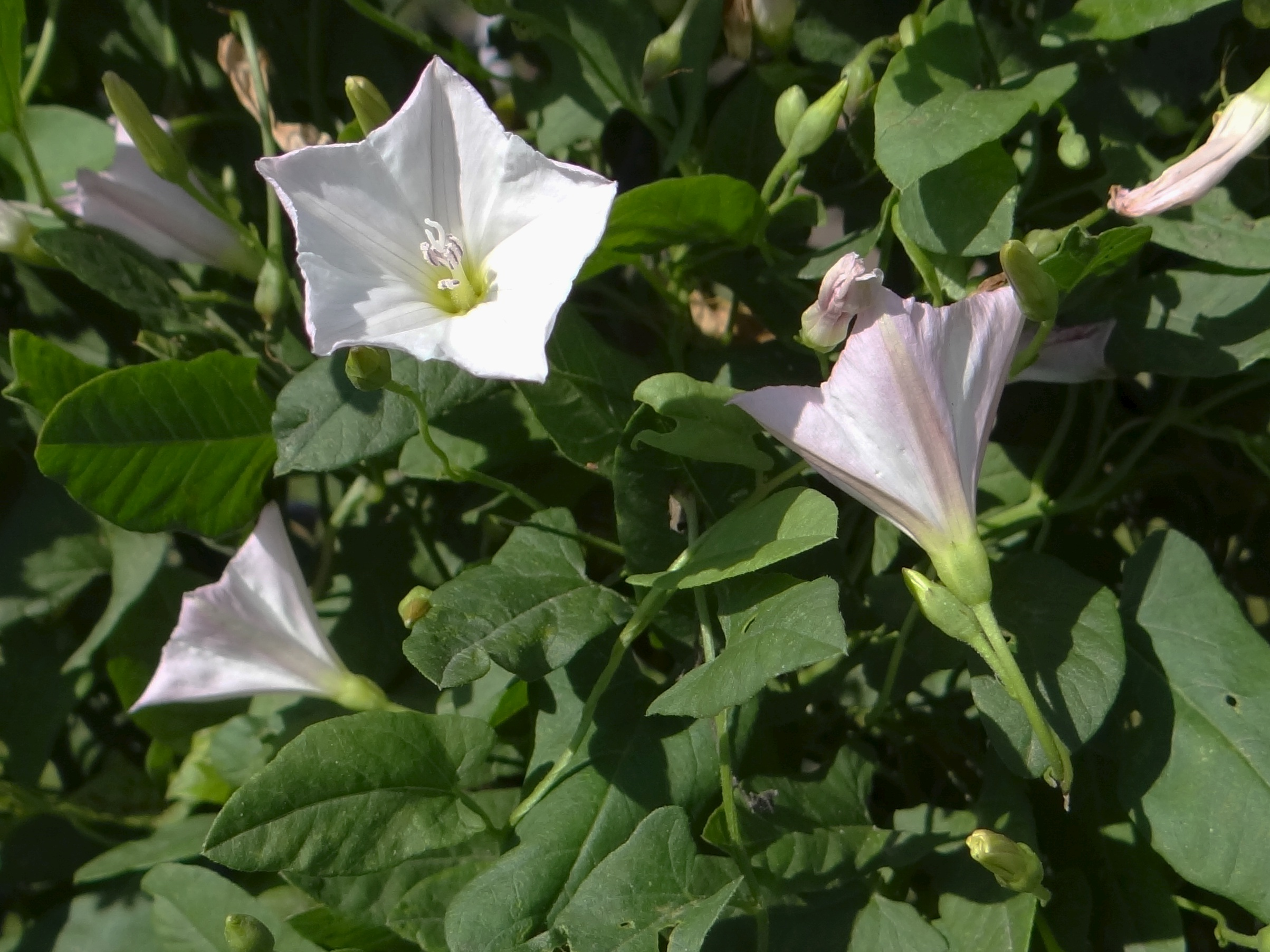 Convolvulus arvensis (location: Poland, Pogórze Rożnowskie, Zakliczyn)